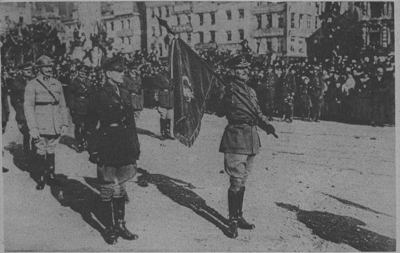 Lille (France - dép du Nord) – Grand'Place, le 28 octobre 1918 : Le général Birwood porte le drapeau, emblème de Lille, lors du défilé organisé à l'occasion de l'entrée officielle des troupes Alliées dans la Ville. les troupes britanniques ont fait leur entrée solennelle dans la ville de Lille pavoisée dans toutes ses rues. Plus de 200 000 personnes s’écrasaient, enthousiastes, de la porte de Canteleu au boulevard Carnot, pour voir défiler, musique en tête, les soldats de la 5e armée, sous les ordres du général Birdwood qu’entourait un brillant état-major. Réf.